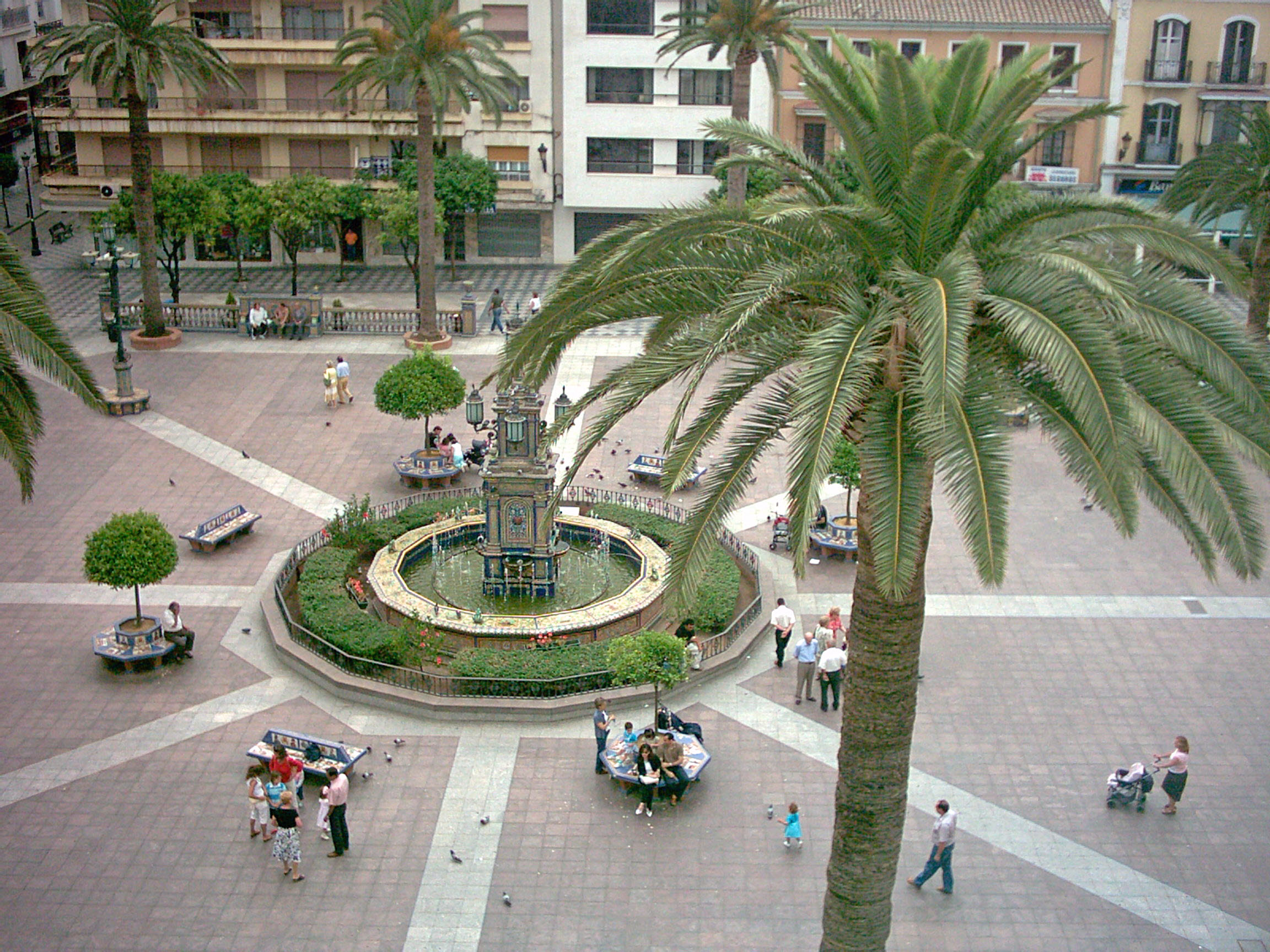 Zona central de la Plaza Alta de Algeciras